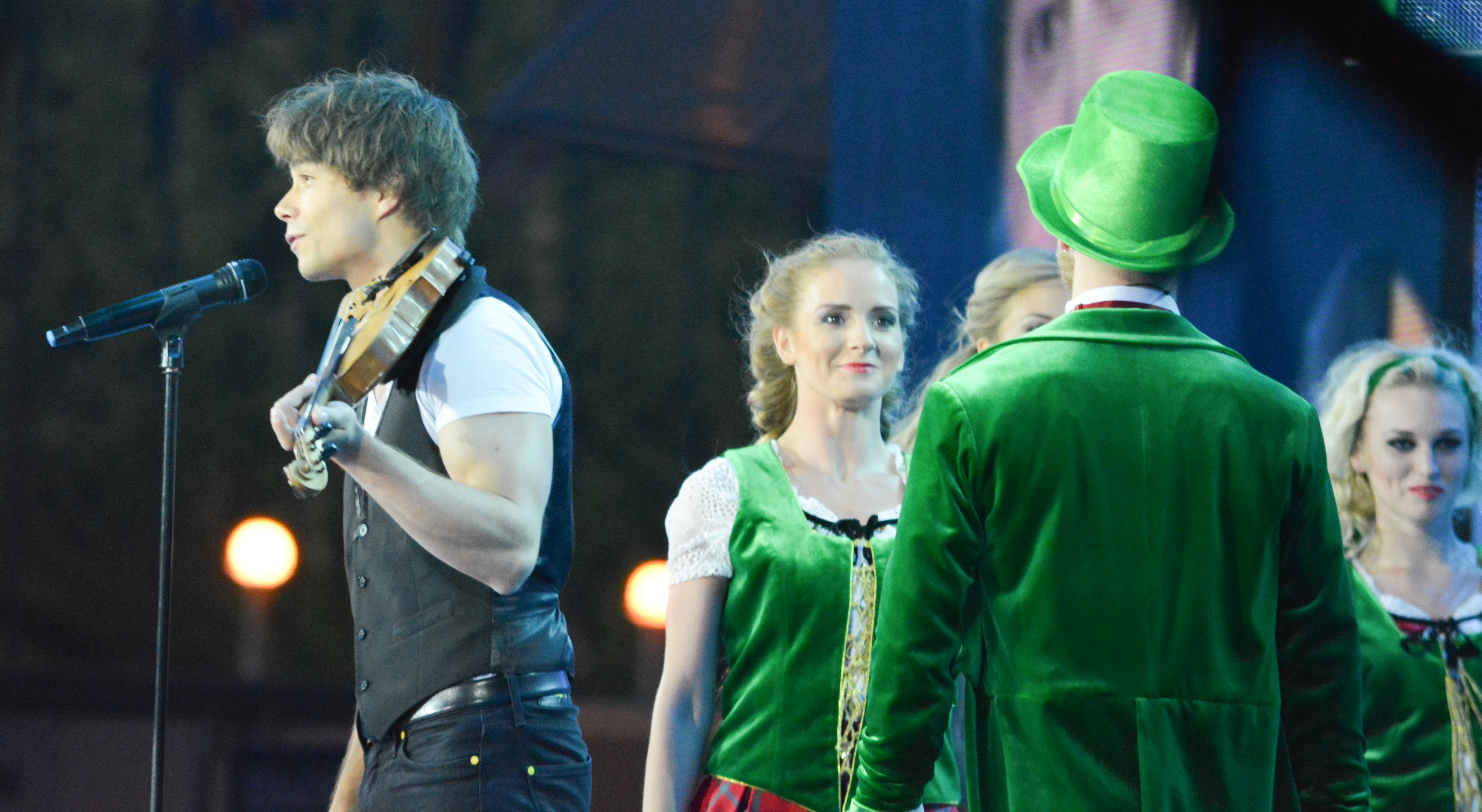 Александр Рыбак. Открытие фестиваля «Славянский Базар в Витебске» 2014.